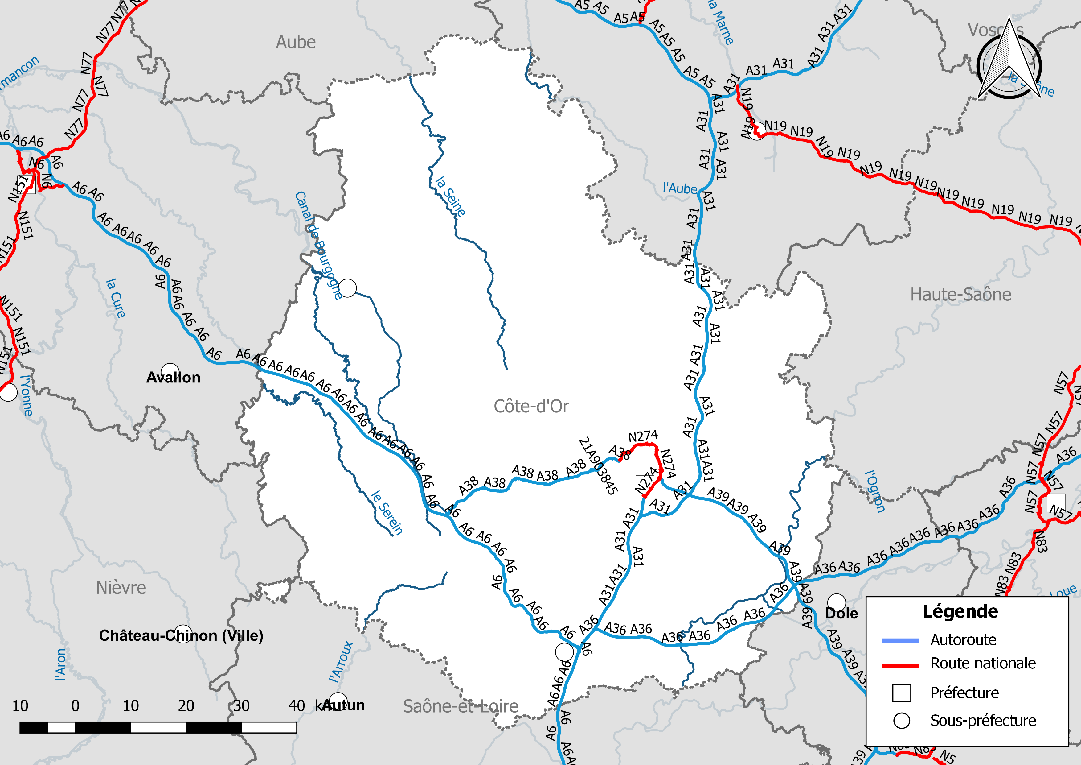 Carte du réseau routier national, constitué des autoroutes et des routes nationales, dans le département de la Côte-d'Or. Situation au 1er janvier 2019.